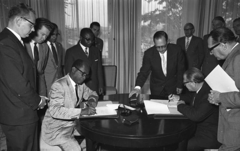 Vertragsunterzeichung im Auswärtigen Amt zwischen Staatssekretär van Scherpenberg und dem Finanzminister von Ghana. Unterzeichung des deutsch-ghanaischen "Vereinbarten Protokolls" über eine Kredithilfe der Bundesregierung für den wirtschaftlichen Aufbau Ghanas; links vorne Finanzminister Gbedemah, rechts vorne Staatssekretär Dr. van Scherpenberg.